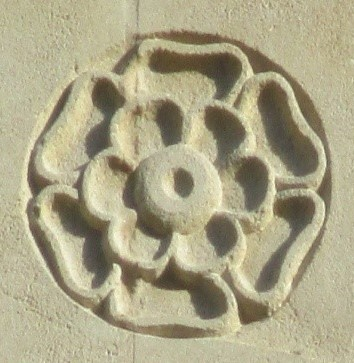 Clusius-Pfingstrose, Ornament am alten Rathaus in Luxemburg Stadt am Krautmarkt (Palais Grand-ducal)